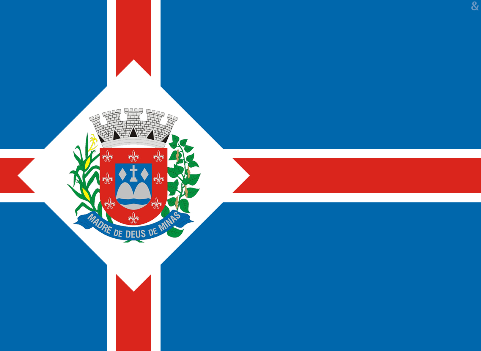 Bandeira Oficial do município de Madre de Deus de Minas